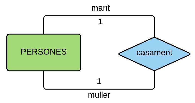 Diagrama que mostra una relació recíproca d'una entitat (persones) i la seva relació (casament).